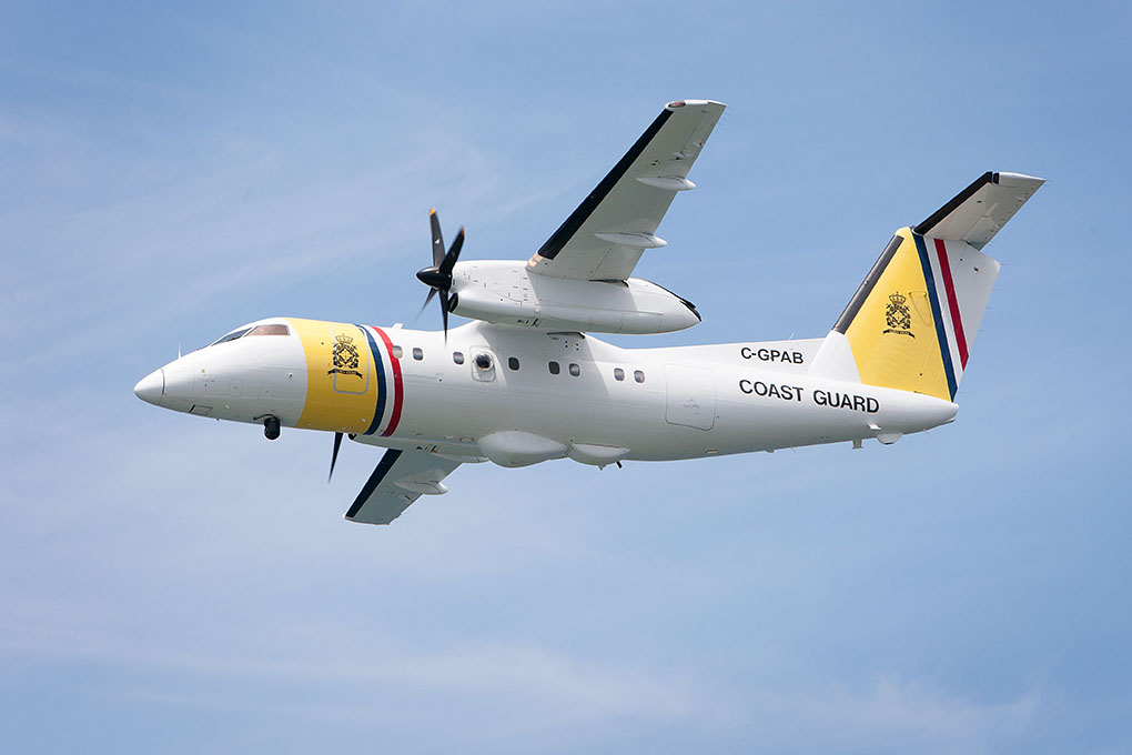 Savaneta, Aruba. 01-05-2013. Open dag Marinierskazerne Savaneta. Foto: Demo van de Dornier van de kustwacht.